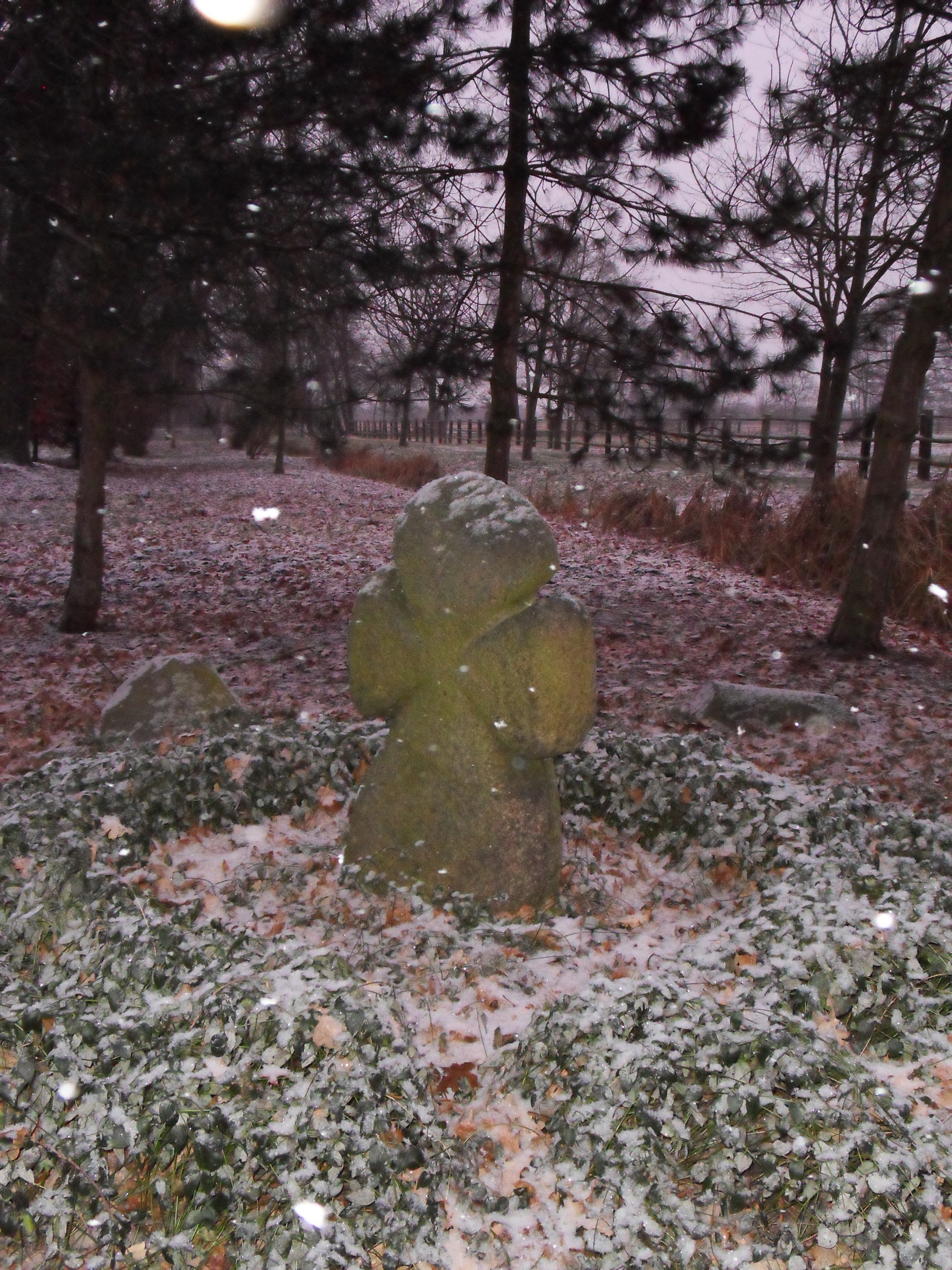 Steinkreuz im Schlosspark Stechau